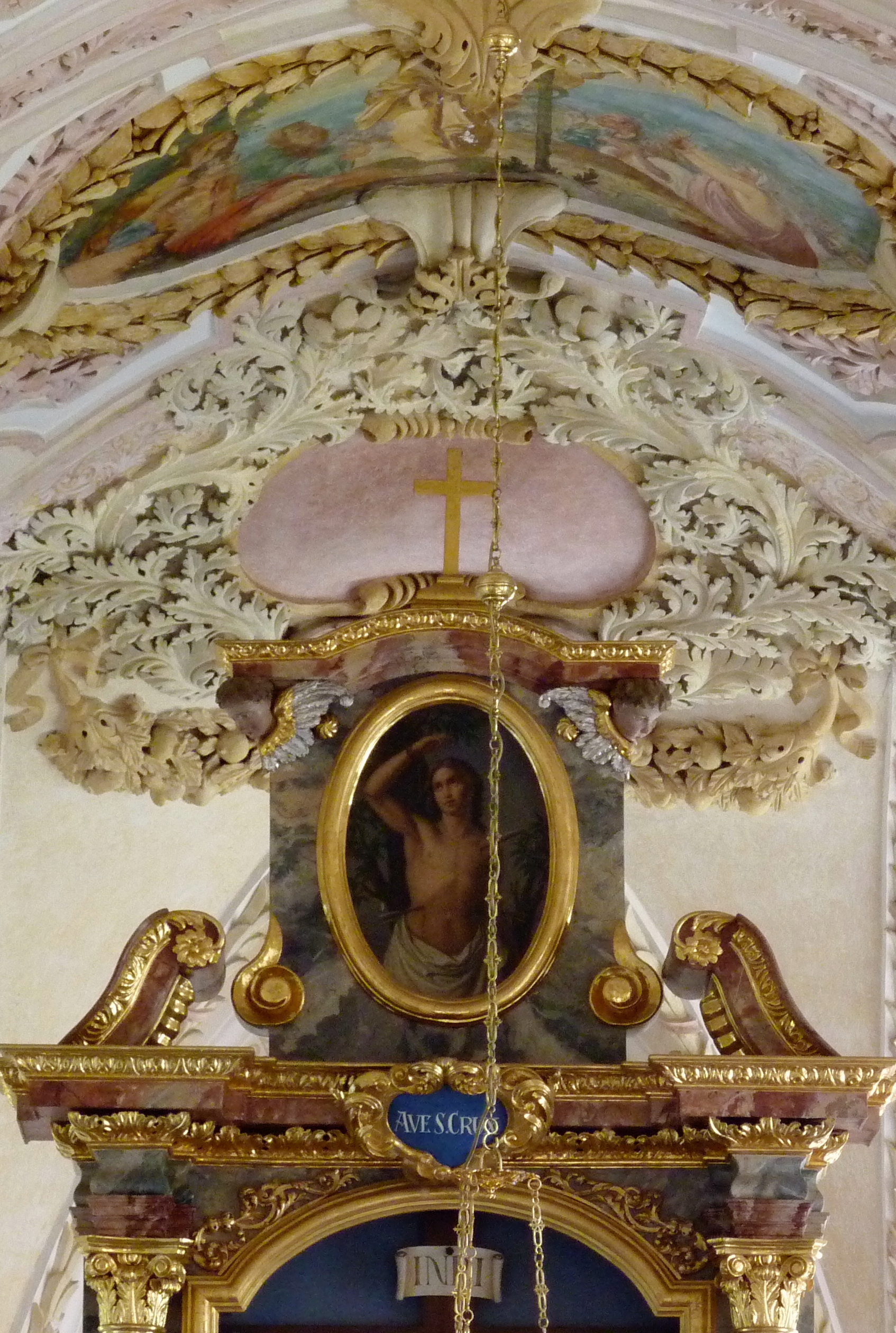 Katholische Filialkirche Heilig Kreuz in Holzhausen (Alling) im Landkreis Fürstenfeldbruck (Bayern/Deutschland), Deckenstuck und Hauptaltar